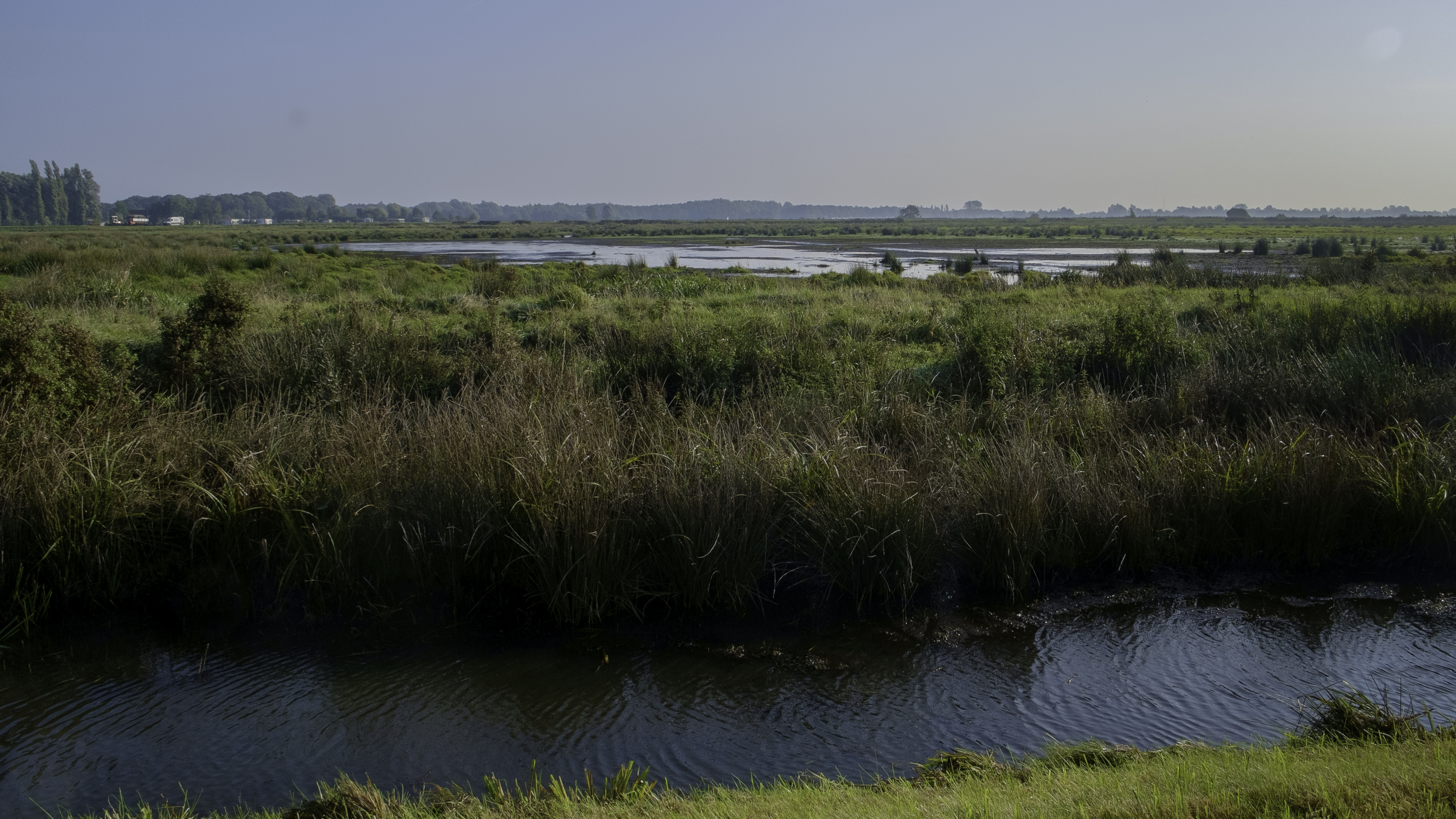 Plas-drasgebied in de Oostpolder